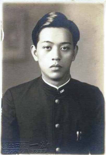 中文（台灣）: 本名施朝暉, 1962出版《台灣人四百年史》日文版，1980年出版漢文版。他在序文開宗明義指出，這是一本台灣勞苦大眾史觀的史書。